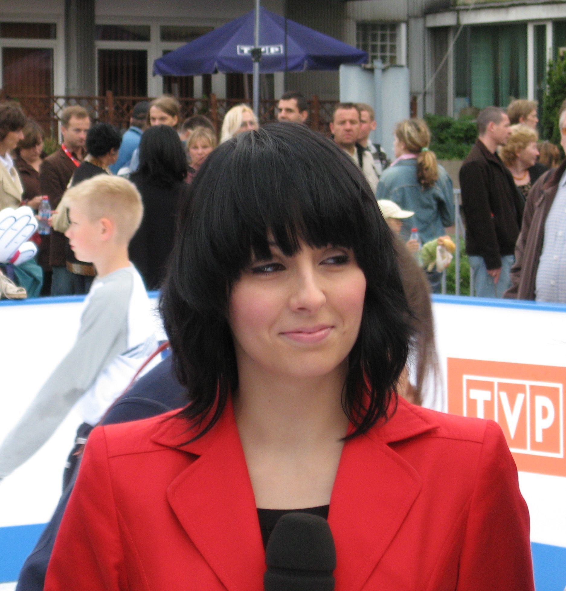 Tatiana Okupnik na dniu Otwartym TVP